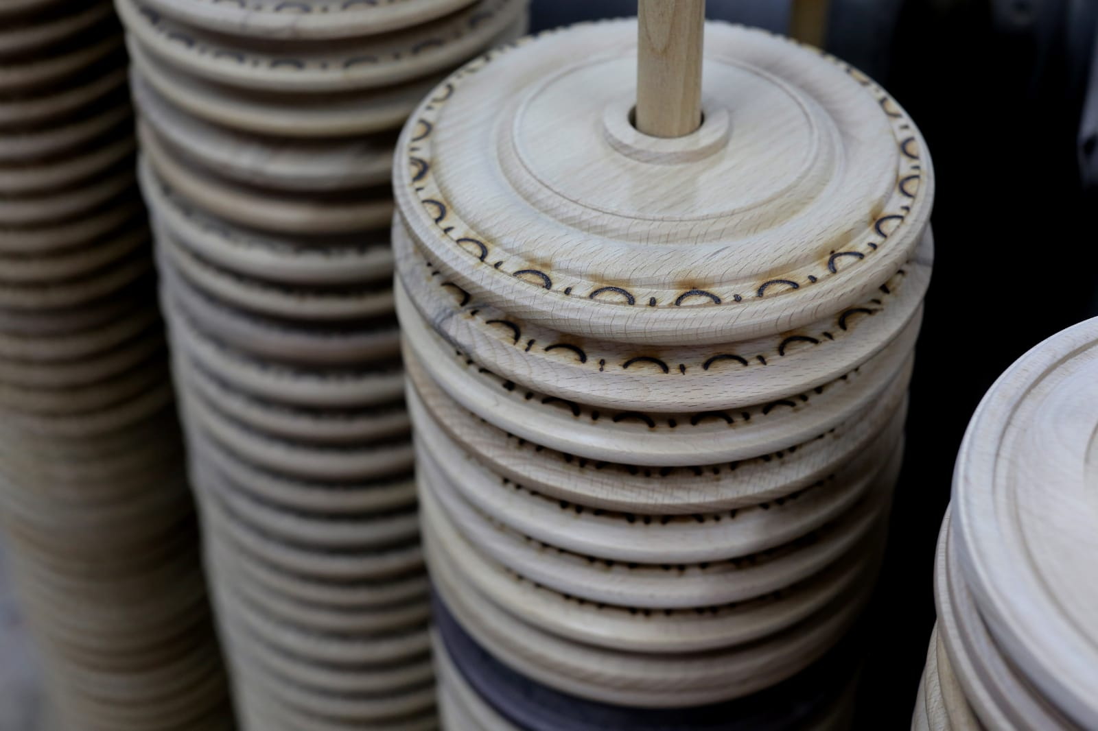 אלו הצלחות שנמצאות בתחילת ובסוף עצי החיים לספר תורה